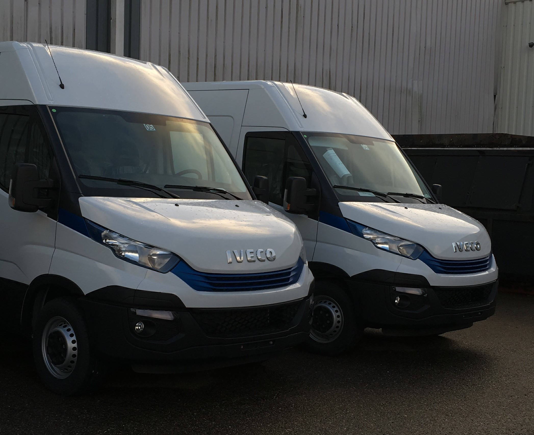 IVECO Daily Blue Power Electric